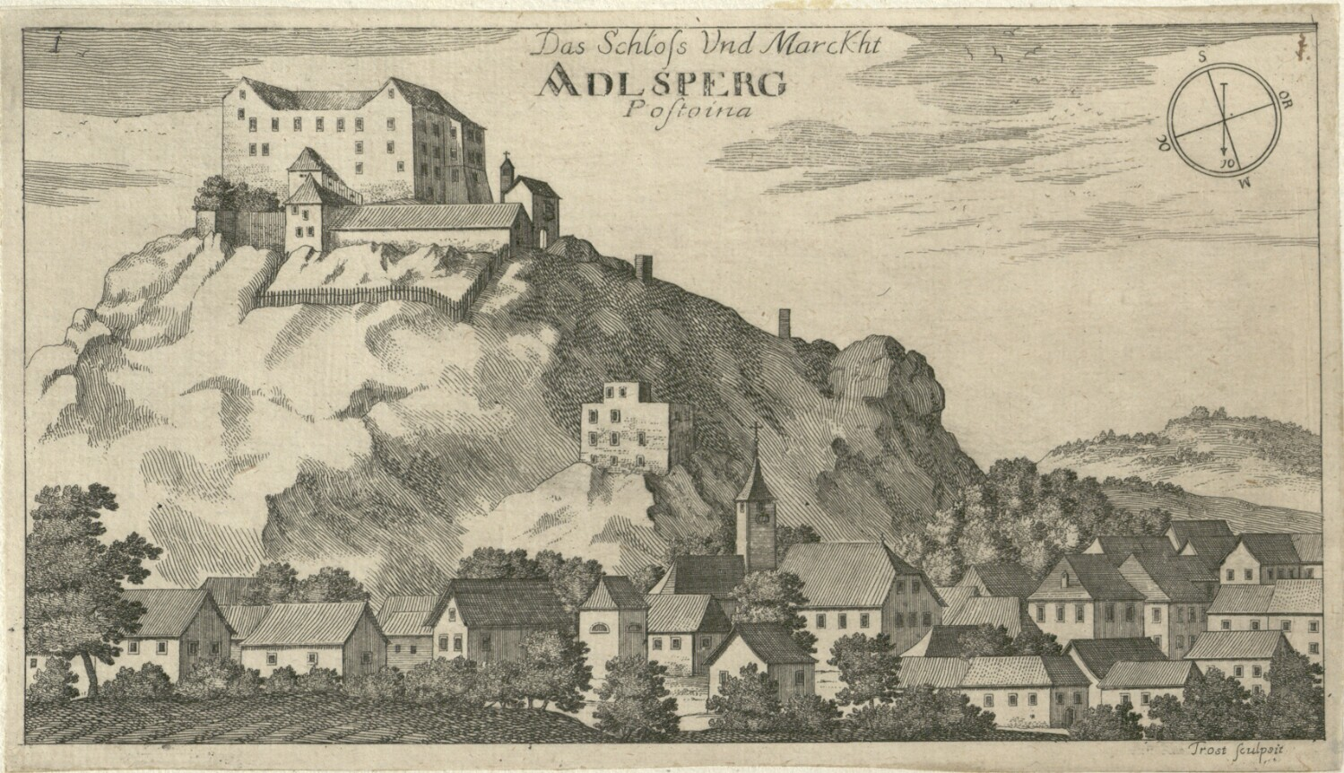 Postojna